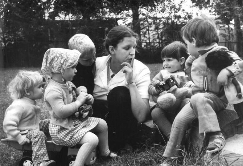 Laezen, Kindergärtnerin mit Kindern ADN-ZB Pätzold-5.7.83 Bez. Schwerin: Abgeordnete (FDJ)-"Sich um andere zu kümmern" ist für Karin BLOHM Lebensmaxime. Täglich betreut sie 13 Kinder der Gemeinde Laezen. Nach der Arbeit wird aus der Krippenerziehrin die ehrenamtliche Bürgermeisterin für die fast 200 Zittower. Mit ihren 22 Jahren ist sie die jüngste Bürgermeisterin der DDR. siehe auch 1983-0705-10u. 11N